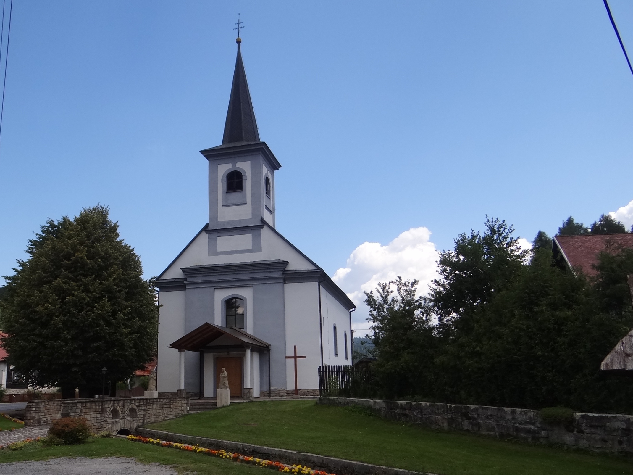 Oravský Biely Potok kościół